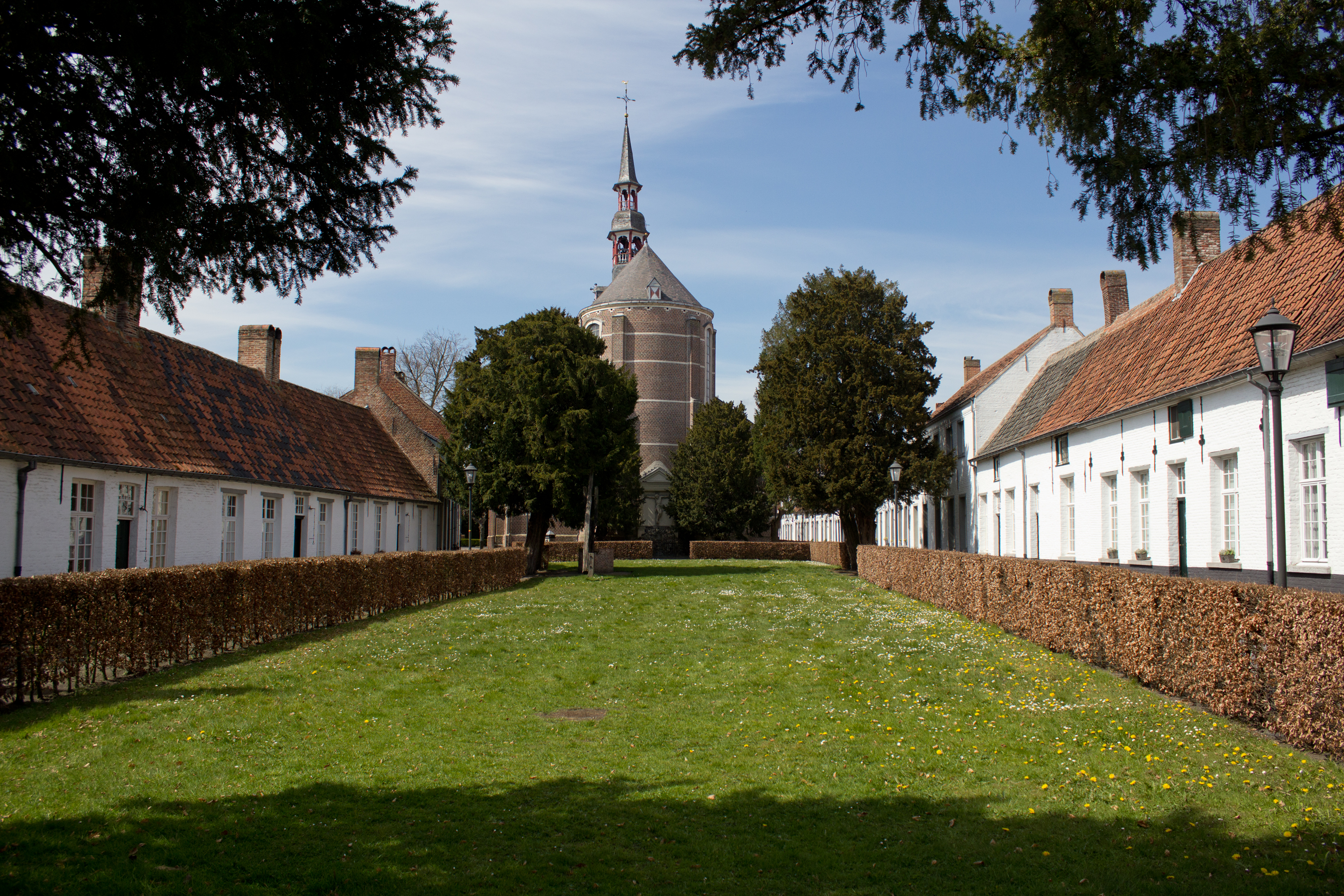 Begijnhofkerk te Hoogstraten